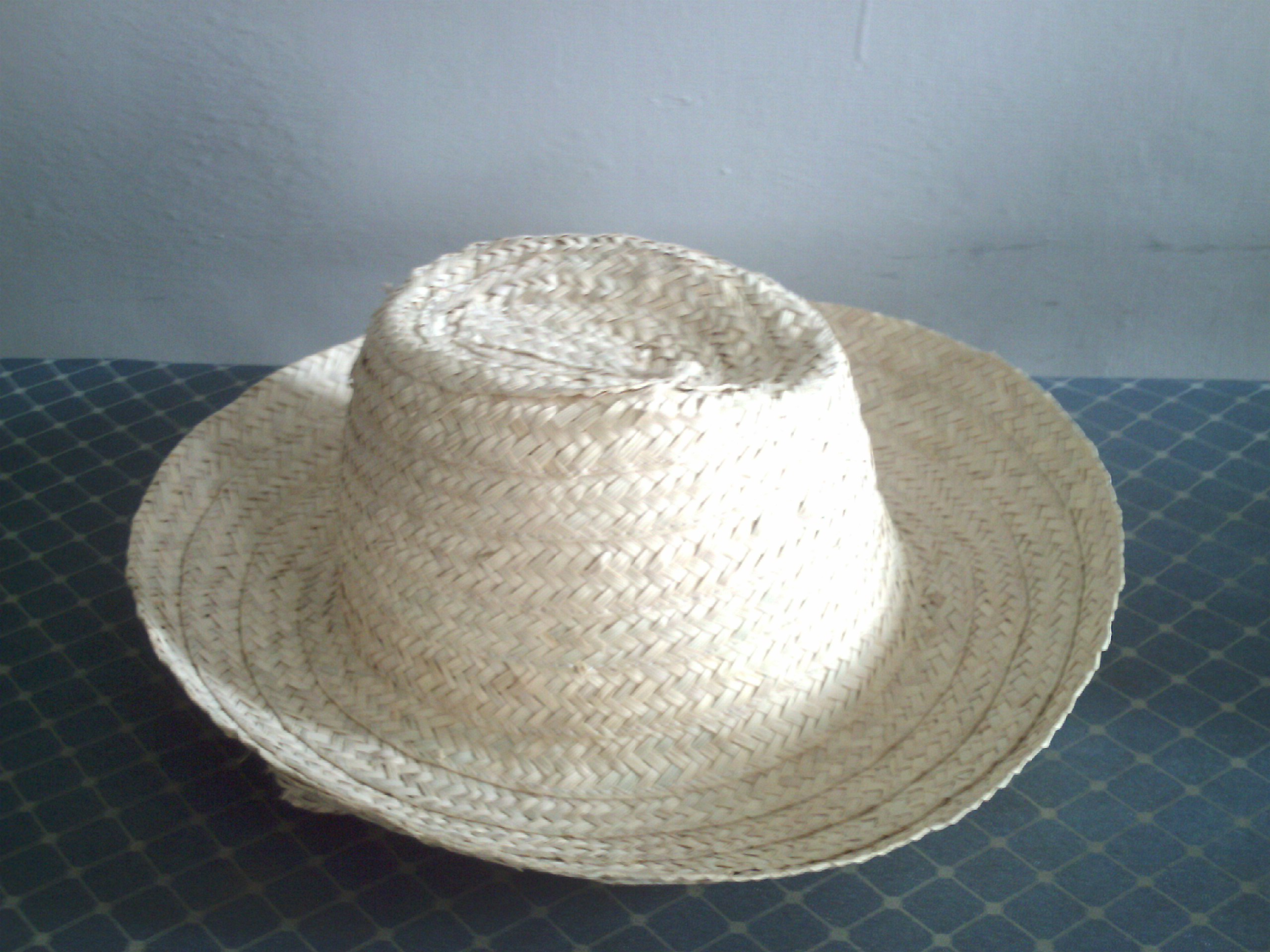 Sombrero de cogollo, típico de la isla de Margarita, Venezuela